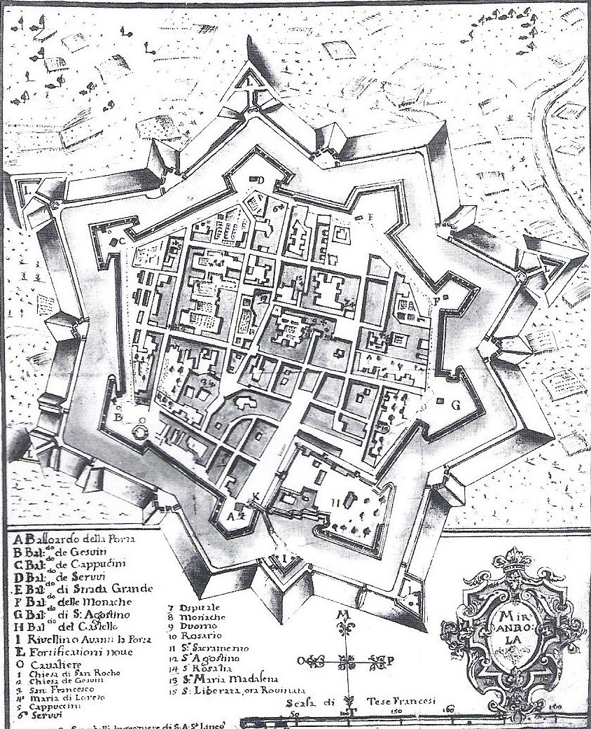 Fortificazioni di Mirandola in un'incisione del XVIII secolo